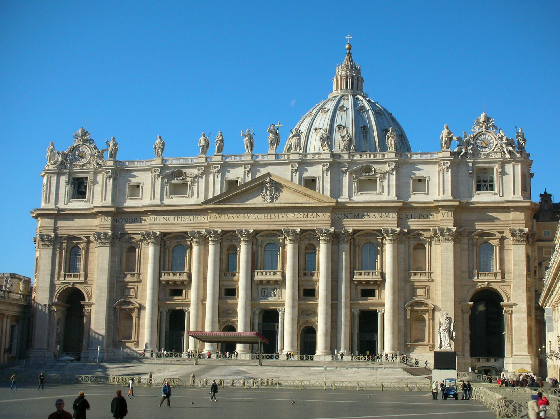 Facciata della Basilica di San Pietro (Roma) dalla piazza antistante